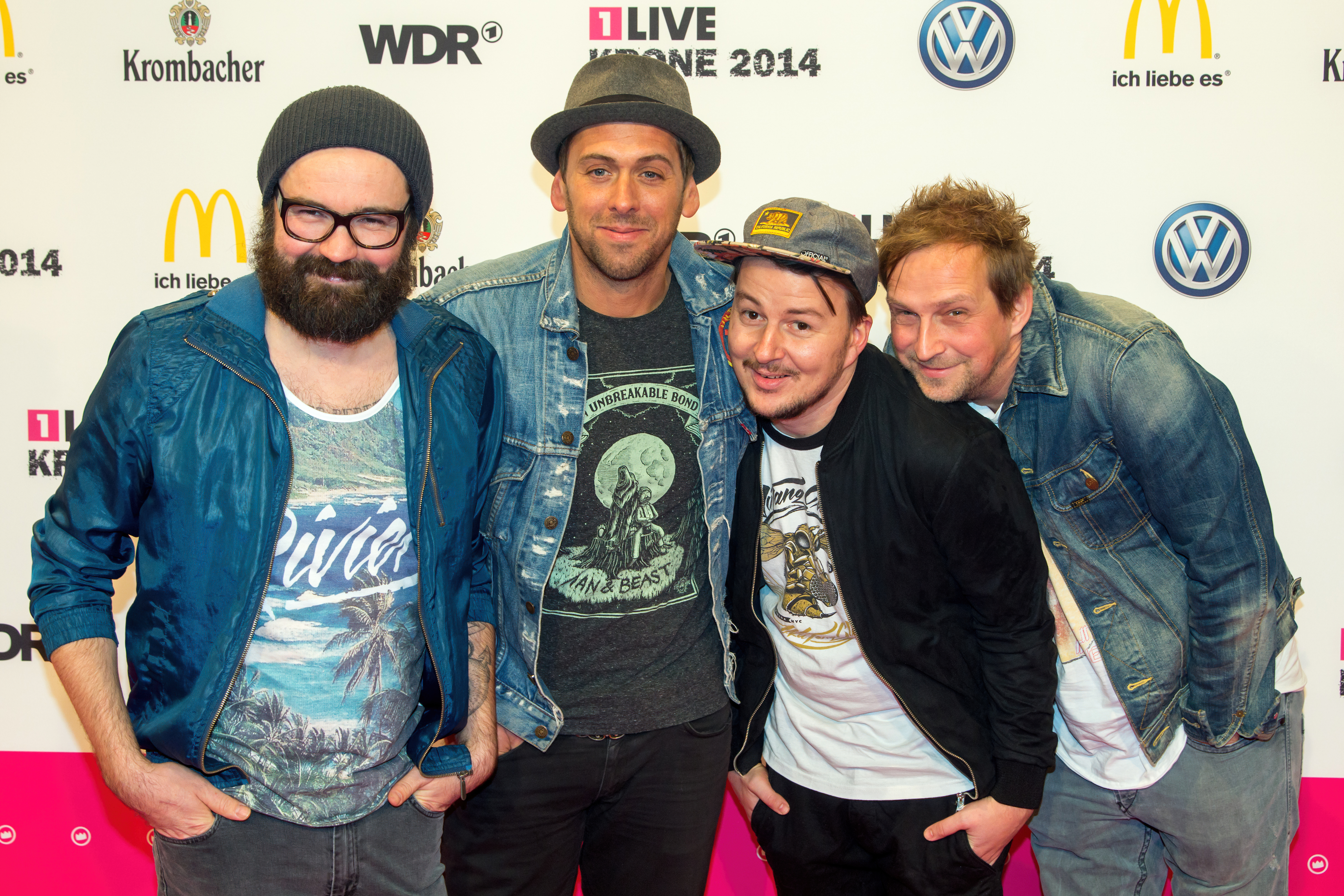 1LIVE Krone 2014 in der Bochumer Jahrhunderthalle: Jupiter Jones auf dem roten Teppich